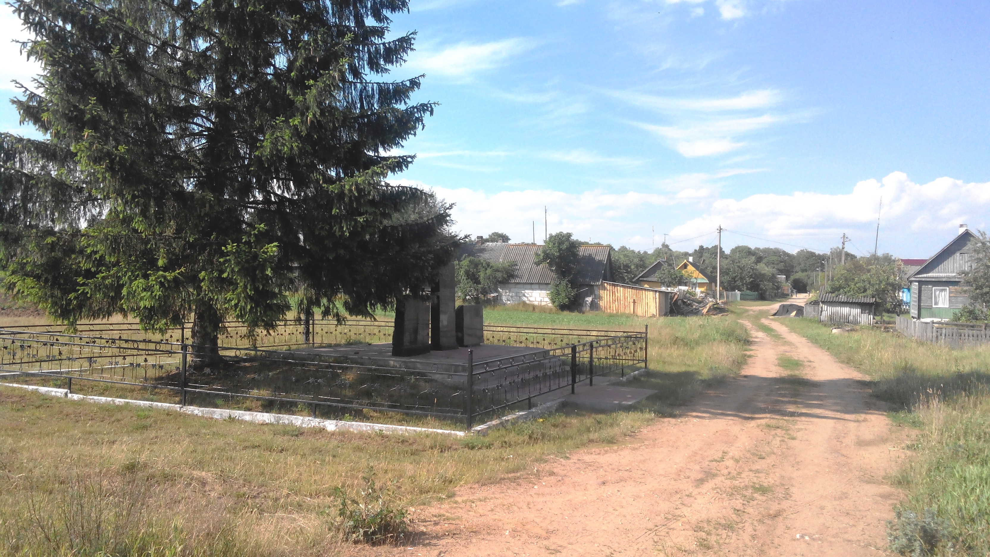 Памятник евреям - жертвам Холокоста в поселке Илья Вилейского района Минской области, убитым нацистами в 1942 году. Находится в начале улицы Революционной.